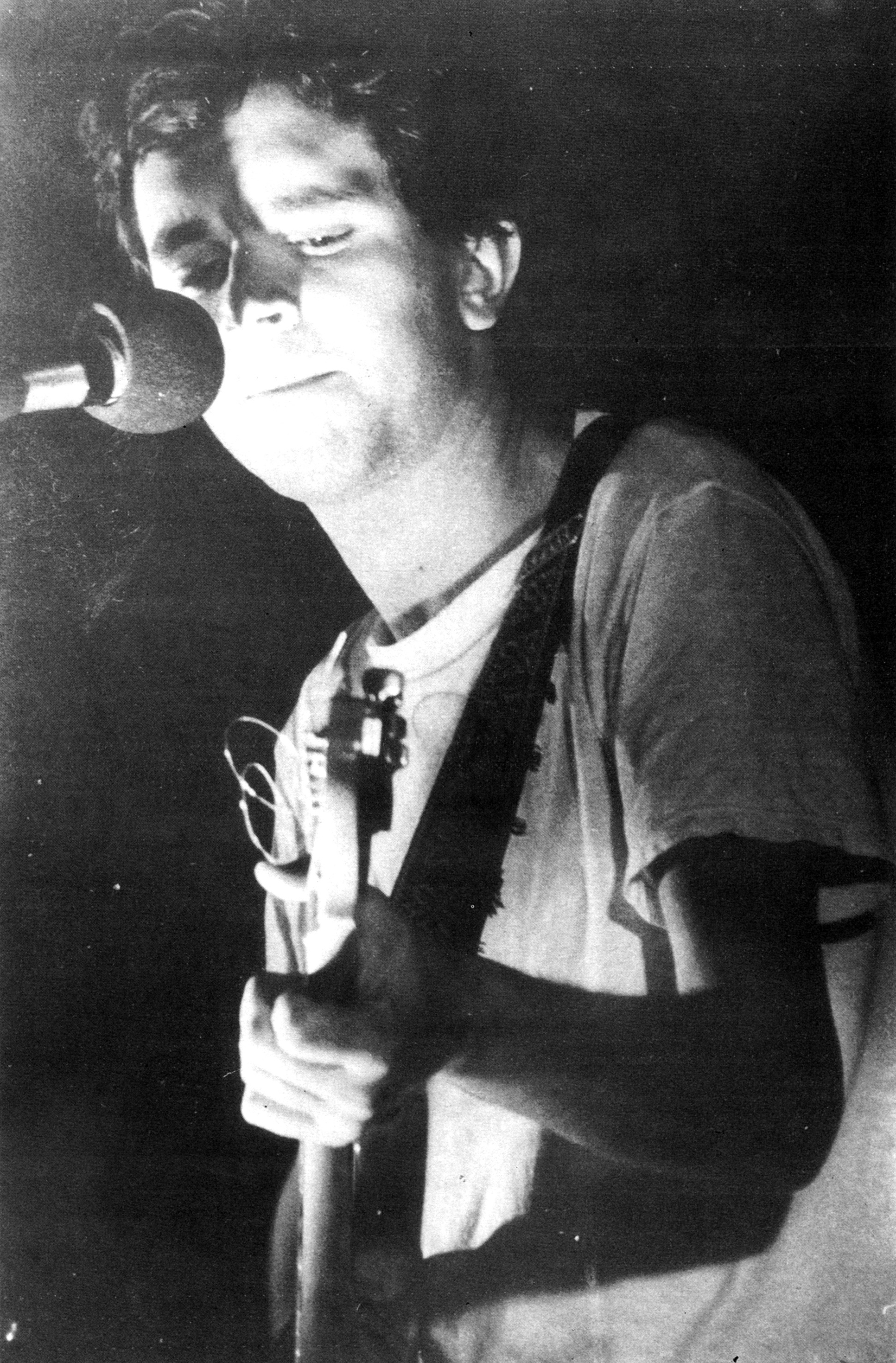 Nafarroa oinez 83, Itoiz taldearen kontzertua